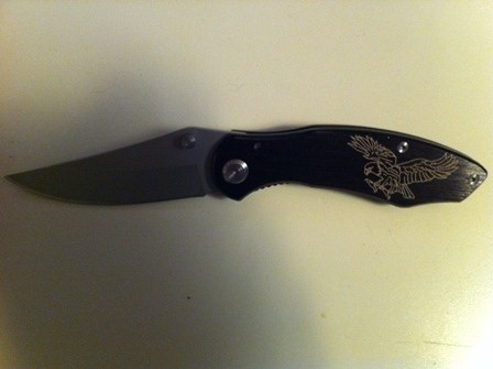 Coltello a serramanico moderno